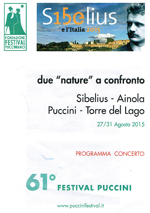 Sibelius 150 concert